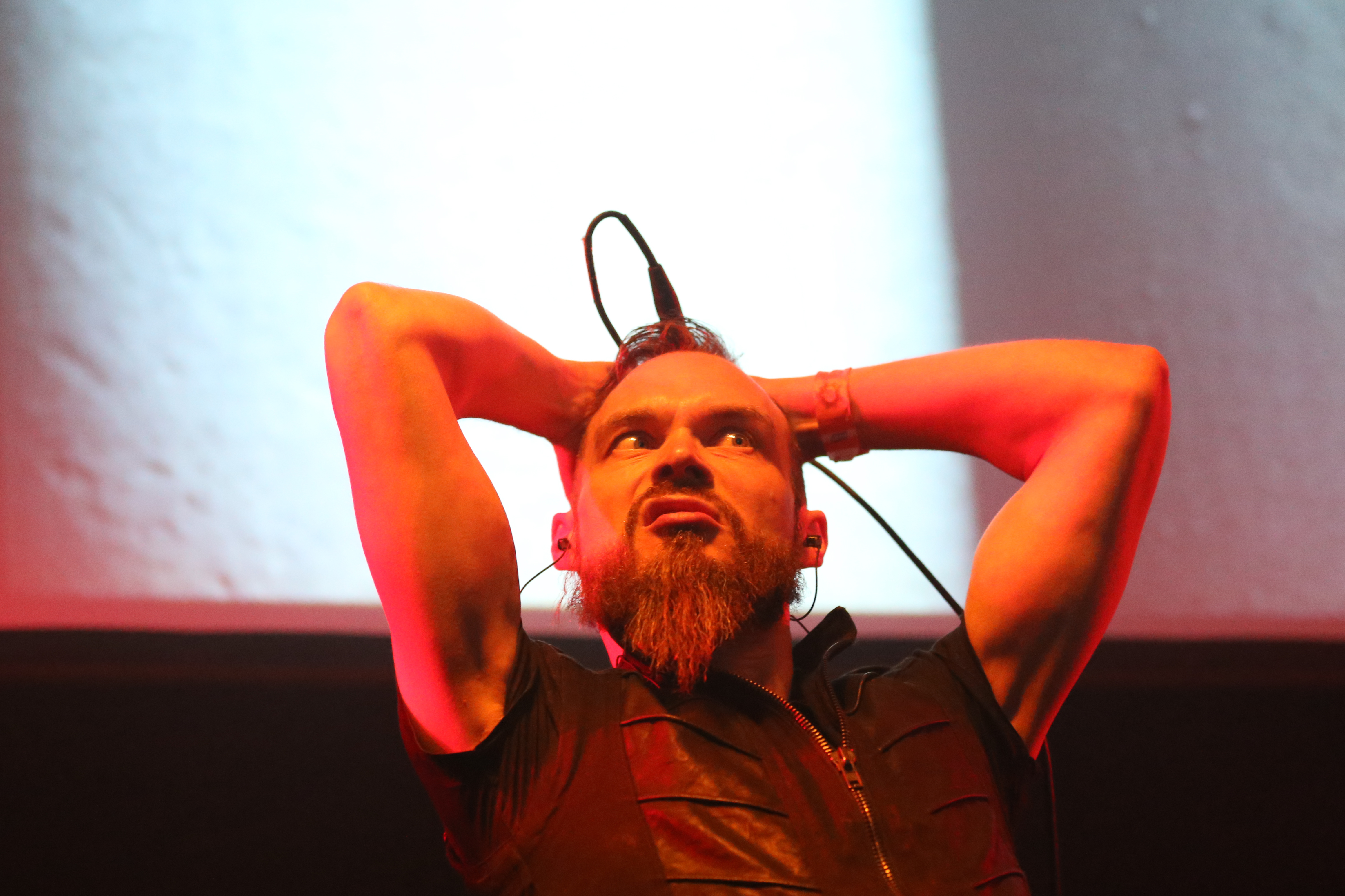 Die Band Plastic Noise Experience (PNE) auf dem Wave-Gotik-Treffen 2016 im Stadtbad in Leipzig.